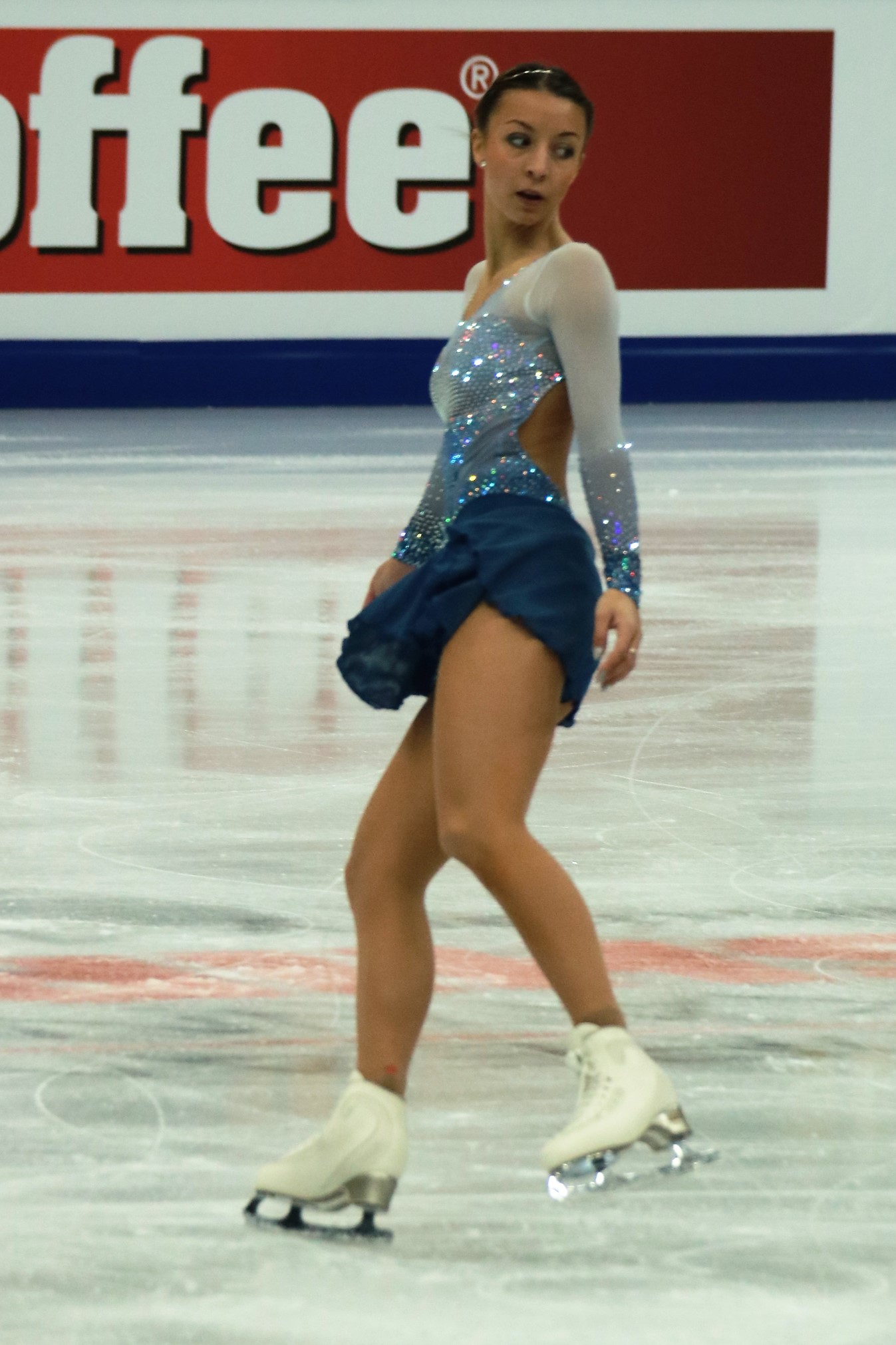 Николь Шотт (Германия) на Чемпионате Европы по фигурному катанию 2018.